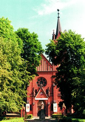 Kościół par. p.w. Najświętszego Serca Jezusowego w Komarówce Podlaskiej (zabytek nr rejestr. A/225)